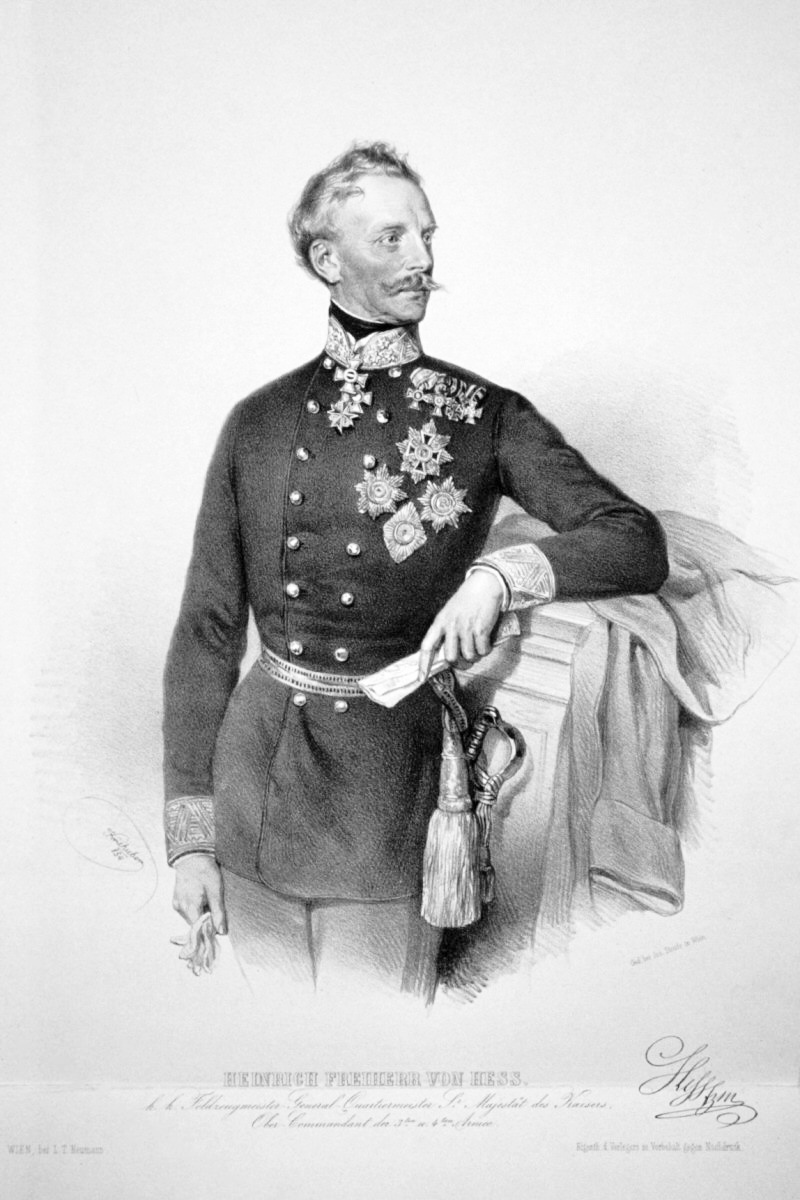 Freiherr Heinrich Hermann Josef von Heß, Lithographie von Joseph Kriehuber, 1854.